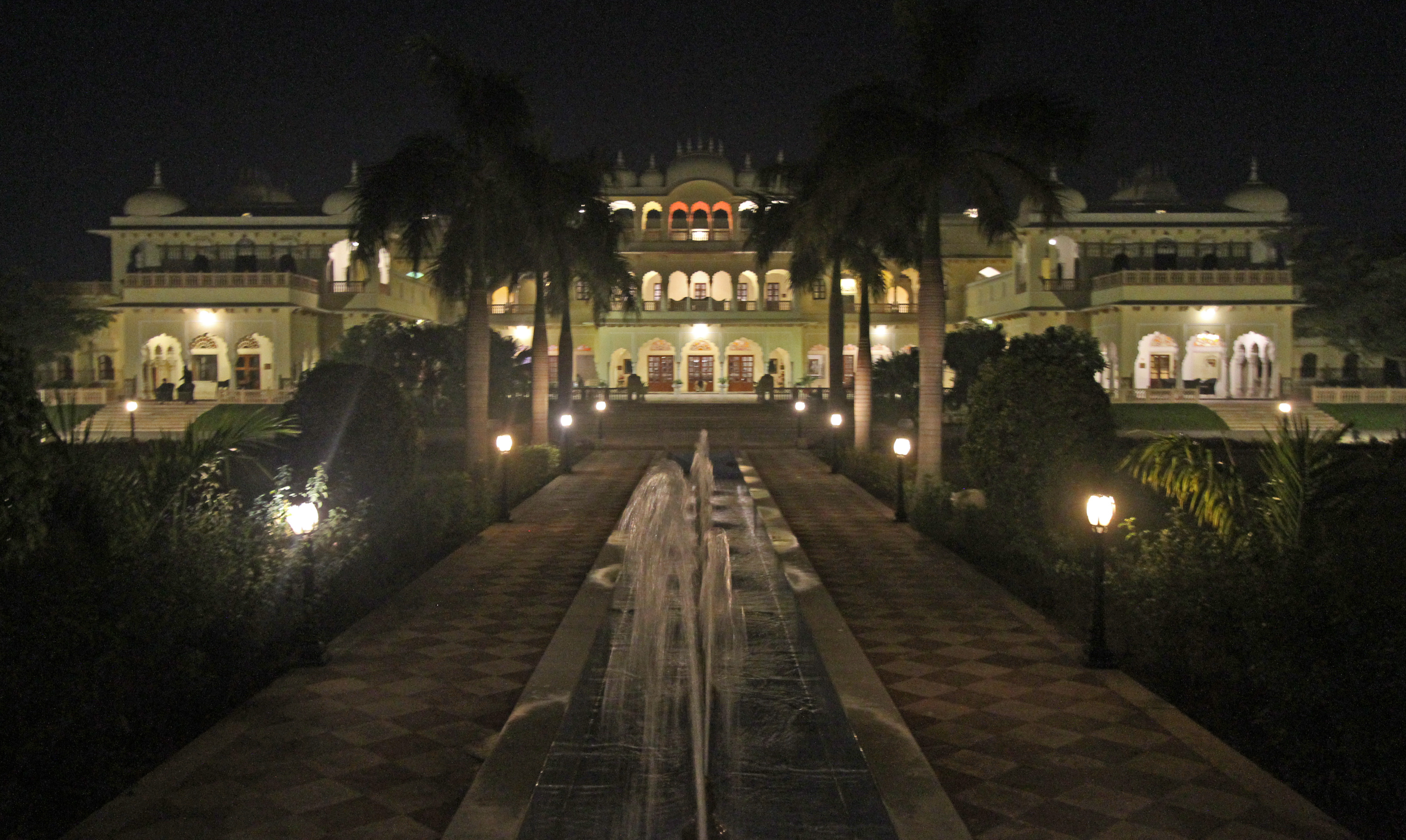 Laxmi Vilas Palace (Bharatpur)